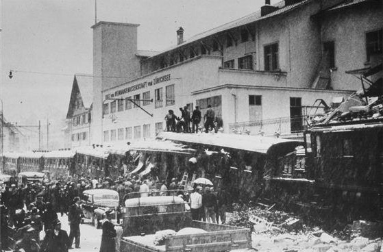 Am 22. Februar 1948 wurde ein ausser Kontrolle geratener Sportzug im Bahnhof Wädenswil auf das Industriegeleis der Obst- und Weinbaugenossenschaft geleitet, wo er entgleiste. Die ersten vier Wagen wurden beim Aufprall teilweise ineinander geschoben.